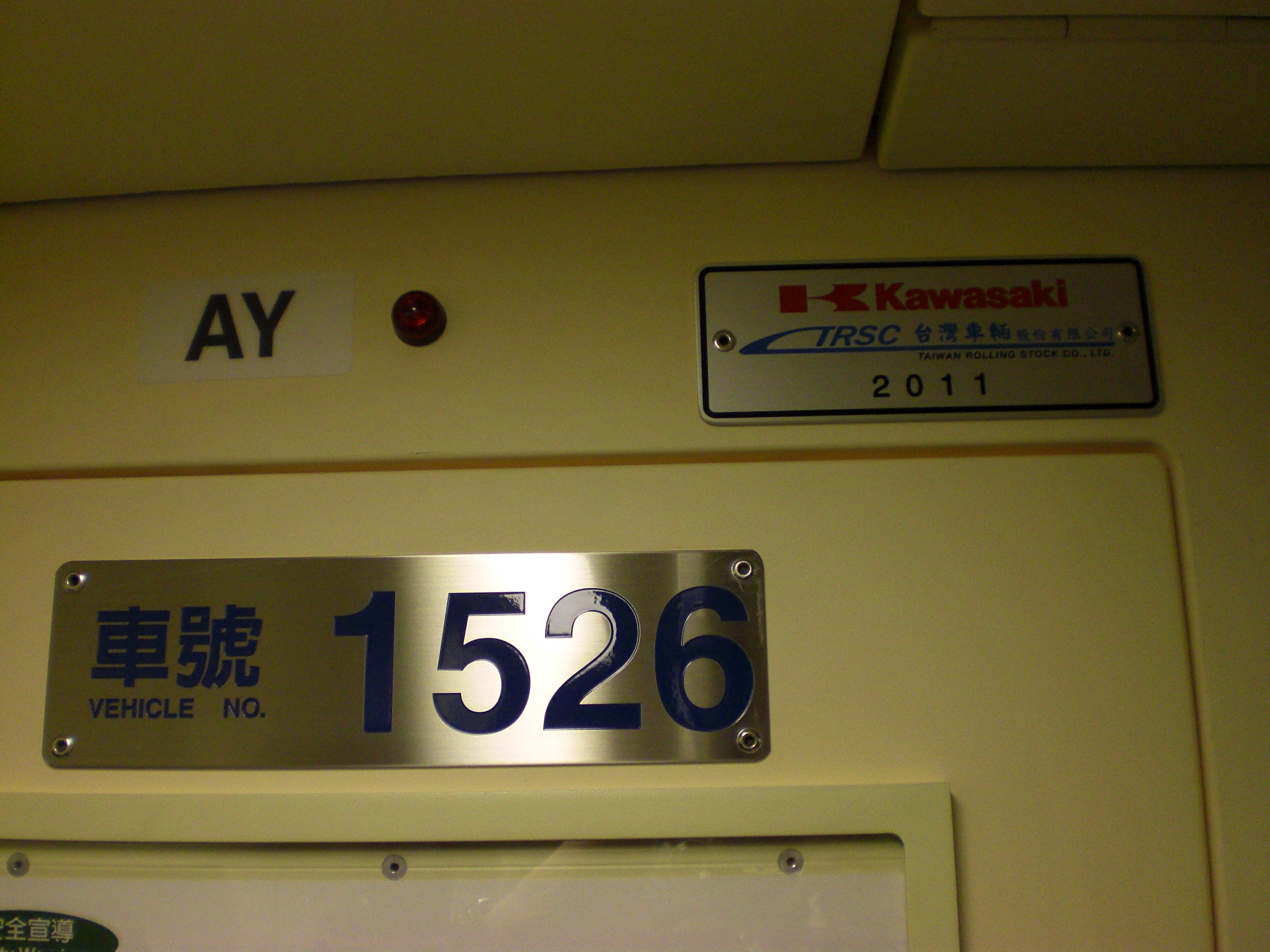 台北捷運381型電聯車1526車廂AY側的車號銘板及川崎重工與台灣車輛銘板